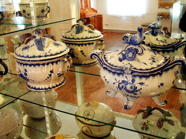 Das Foto zeigt Exponate im Kulturhistorischen Mseum in Stralsund in Stralsund im März 2007.